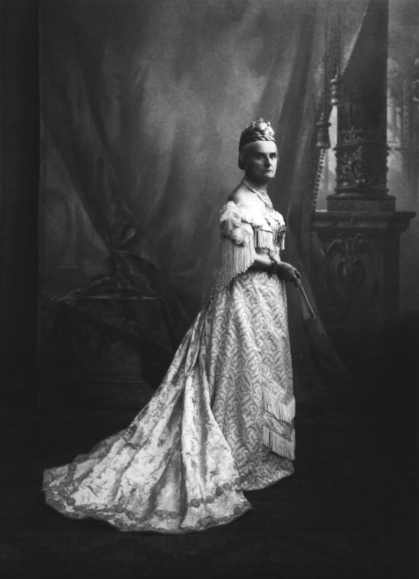 Oberhofmeisterin Gräfin Bothmer vor Prospekt